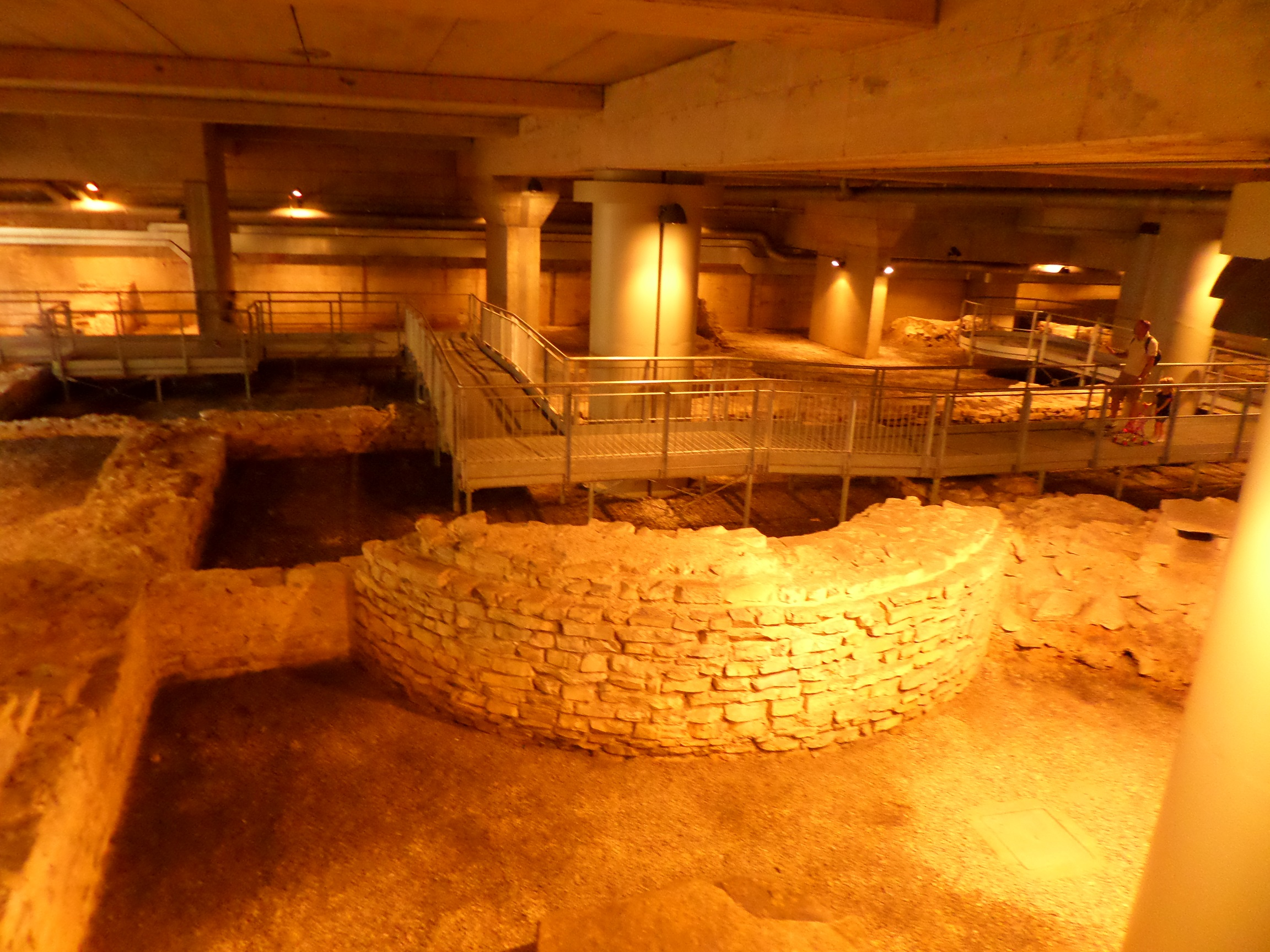 Terme di Epoca Romana, Como viale Lecco